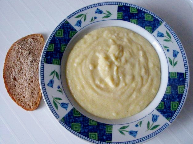 Чир: страва з кукурудзяного борошна звареного на молоці